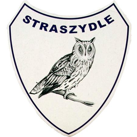 Herb Straszydla